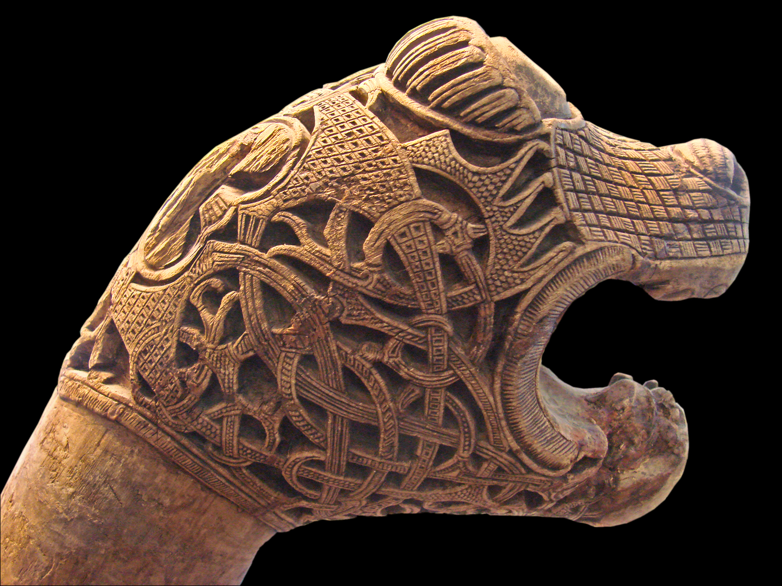 Cinq poteaux à tête animale ont été trouvés dans la tombe d'Oseberg. Chaque animal a la gueule béante et la surface est recouverte d'animaux entrelacés. Ces poteaux pourraient avoir une fonction religieuse. Leur qualité artistique et technique traduit la maîtrise atteinte par les sculpteurs vikings. Le bateau d'Oseberg, mis au jour en 1904, a été construit entre 815 et 820 et a été utilisé comme bateau funéraire pour une femme de haut rang qui est morte en 834. Le corps se trouvait dans une chambre funéraire en bois placée sur le pont. Autour du corps ont été découverts de nombreux objets en bois, cuir et textiles. Le musée présente trois bateaux vikings, très bien conservés, ainsi que des objets, qui ont été découverts dans trois tertres funéraires près du fjord d'Oslo. la figure animale a été utilisée comme un bélier pour pousser les gens dans l'eau.